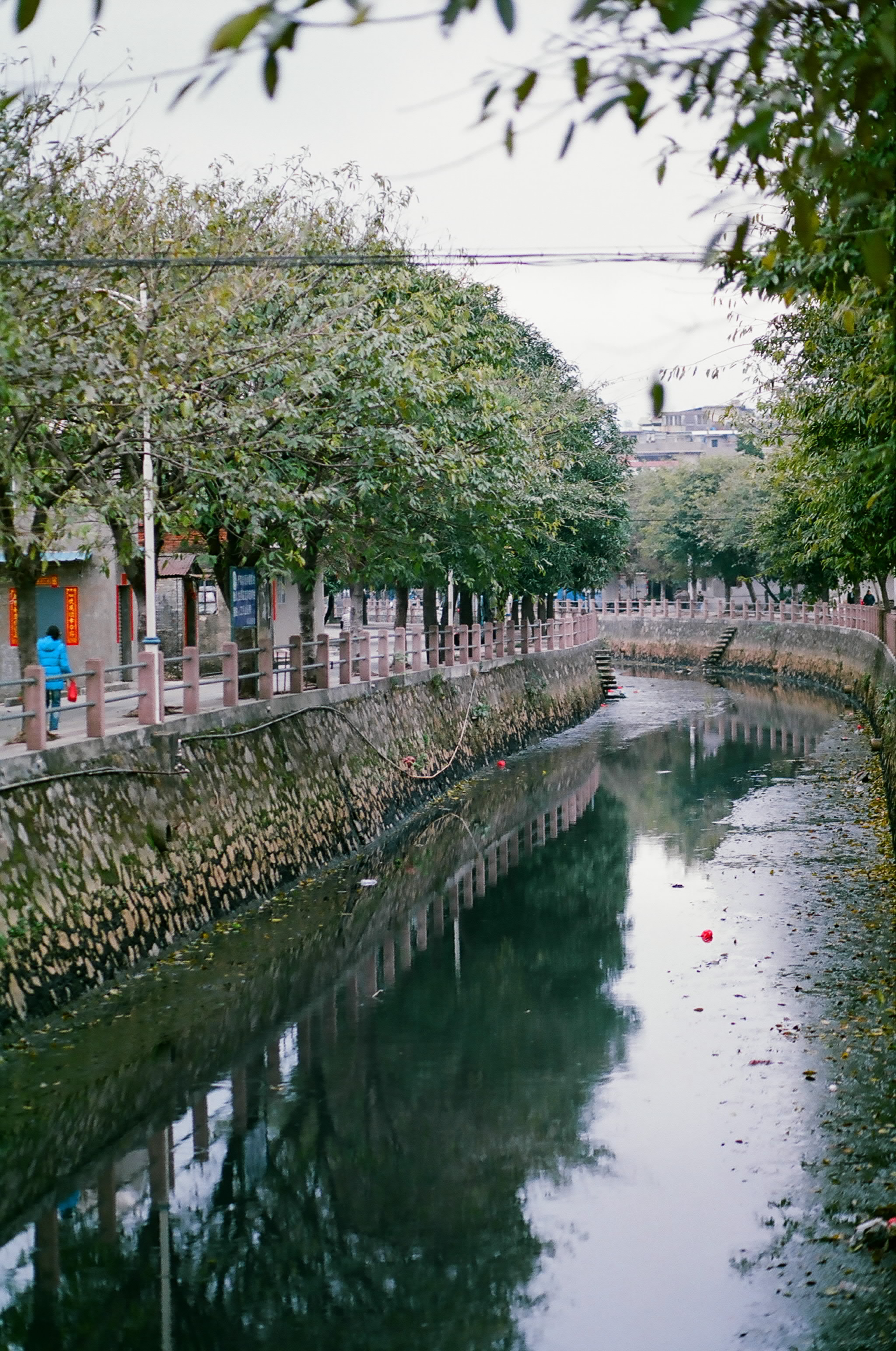 粵語: 2012年紫水河